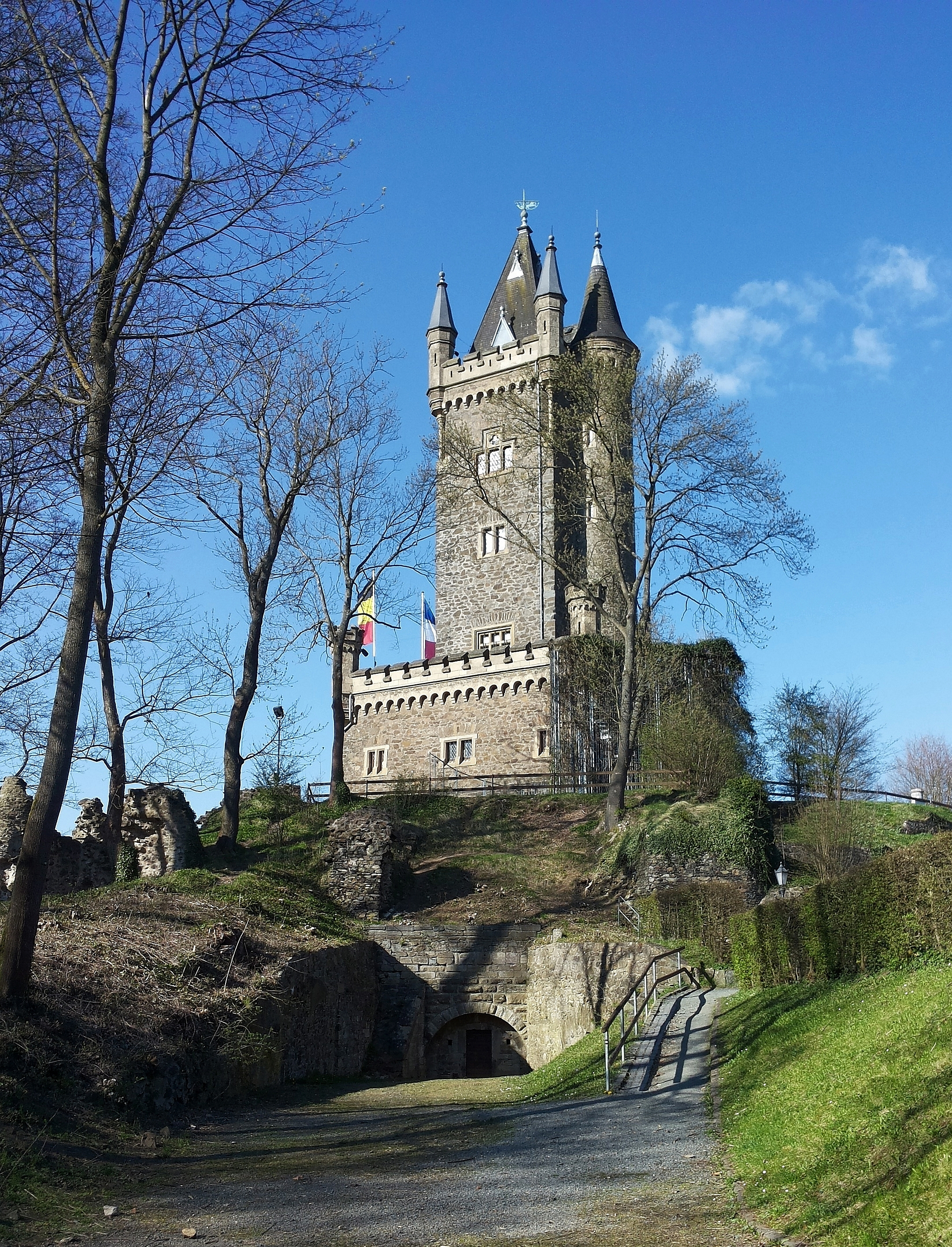 Dillenburg, denkmalgeschützter Wilhelmsturm, Schloßberg 6, über den Ruinen des Schlosses 1875 errichtet